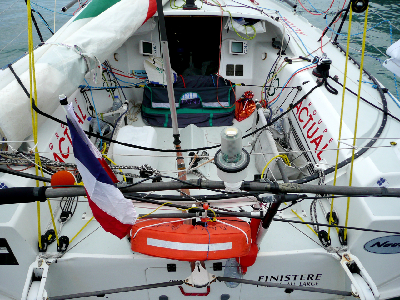 Le 6.50 Classe Mini "Groupe Actual" à l'arrivée à Salvador de Bahia (Brésil) en 2007